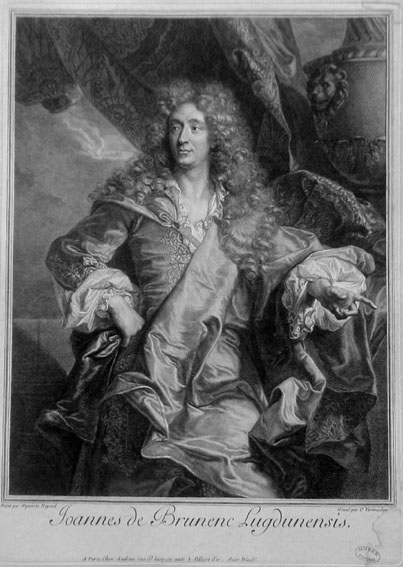 Jean de Brunnenc